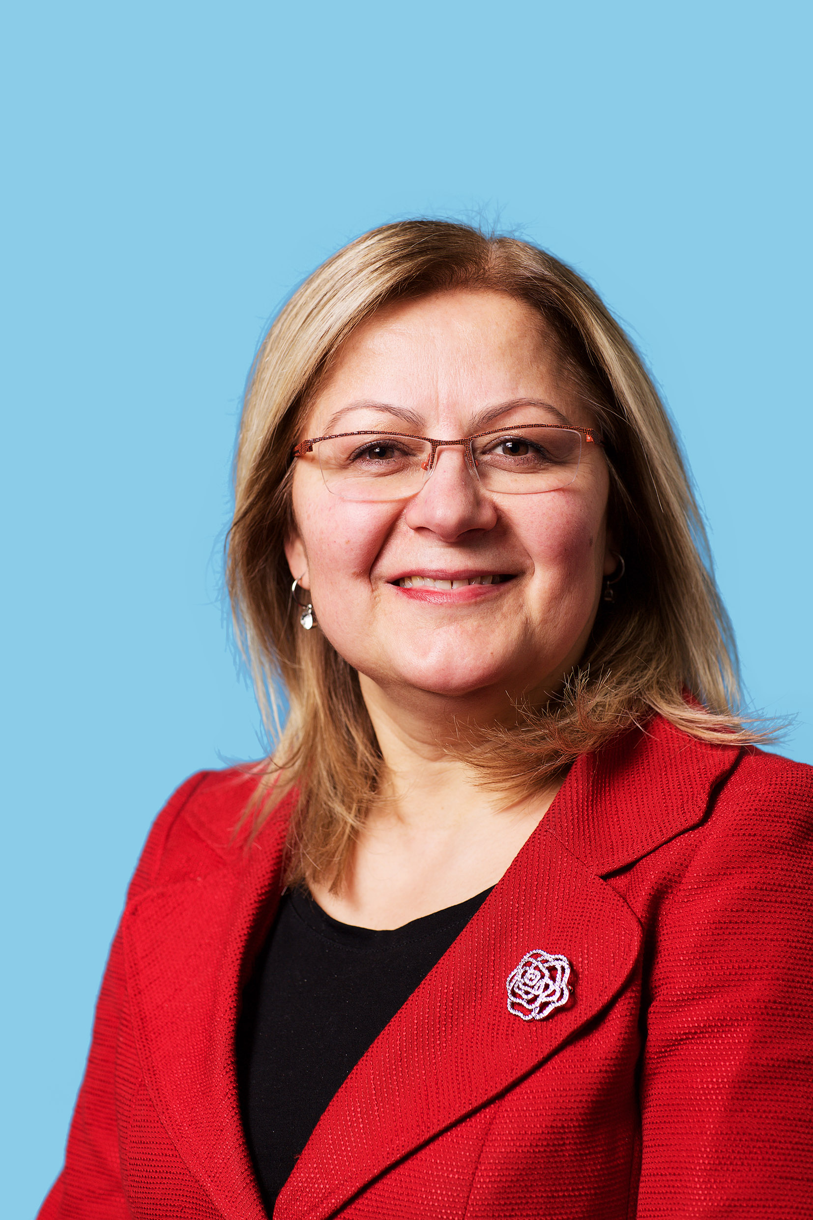 13 februari 2016. Tweede Kamerlid voor de Partij van de Arbeid. Foto: Lex Draijer.